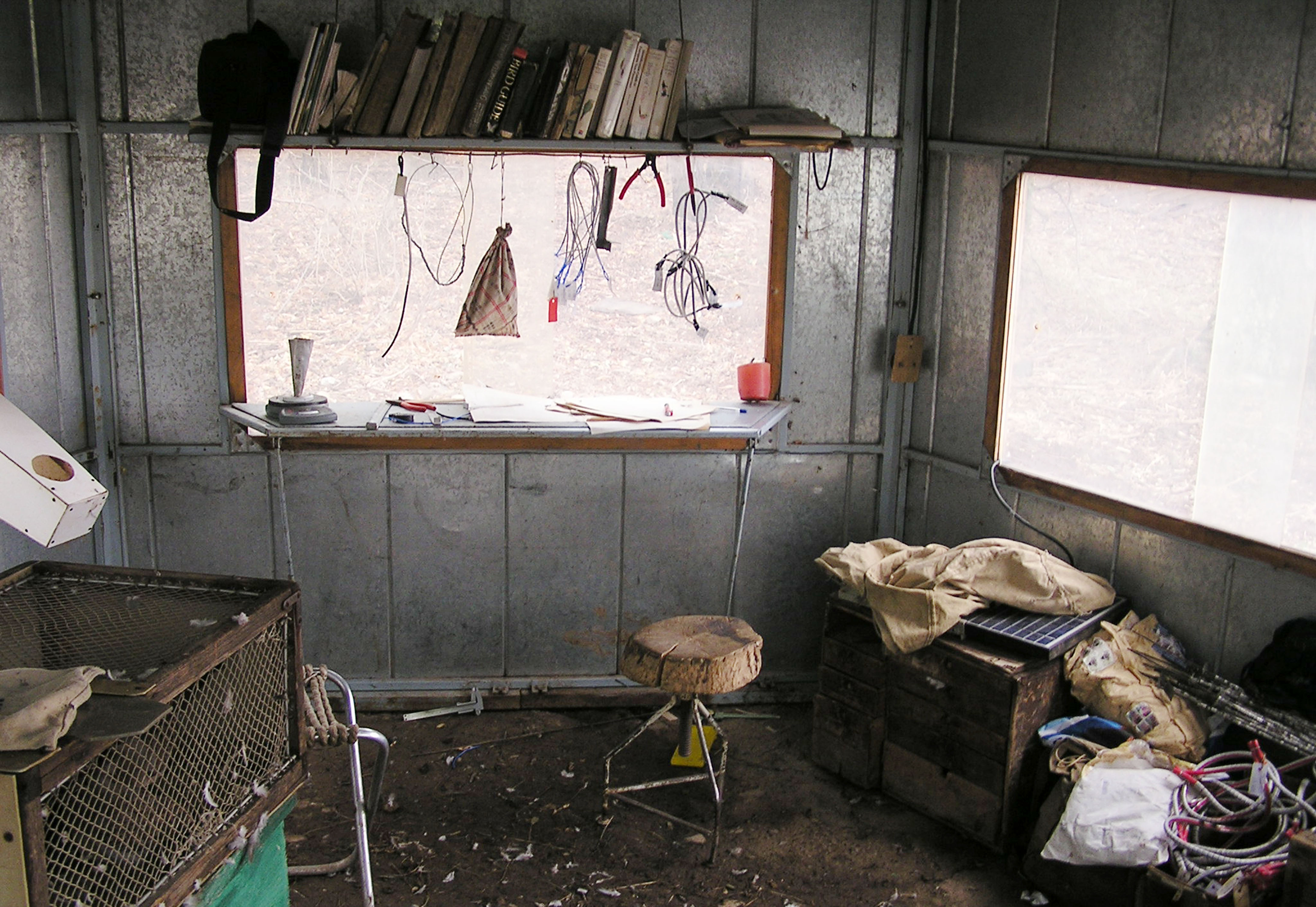 Лаборатория для кольцевания птиц